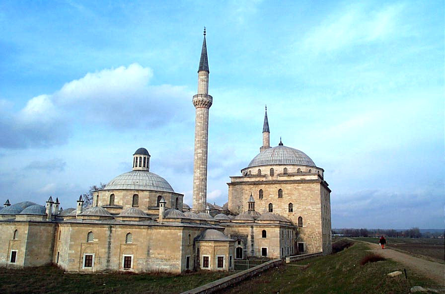 (Darüşşifa) Hospital at Ottoman Empire,1488,Edirne Turkey